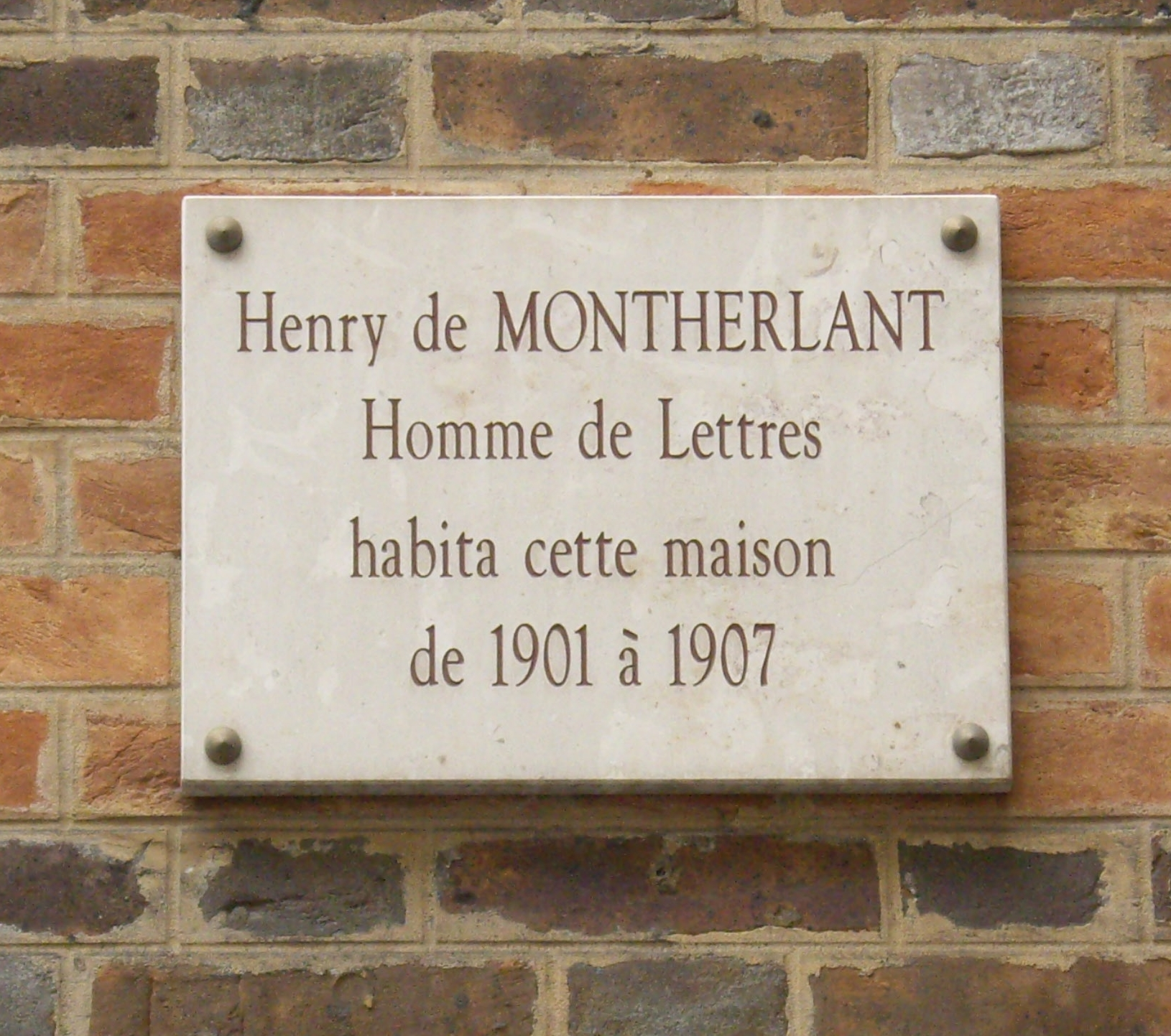 Plaque apposée au n° 106 de la rue Lauriston, Paris 16e, où habita l'écrivain Henry de Montherlant (1895-1972) de 1901 à 1907.